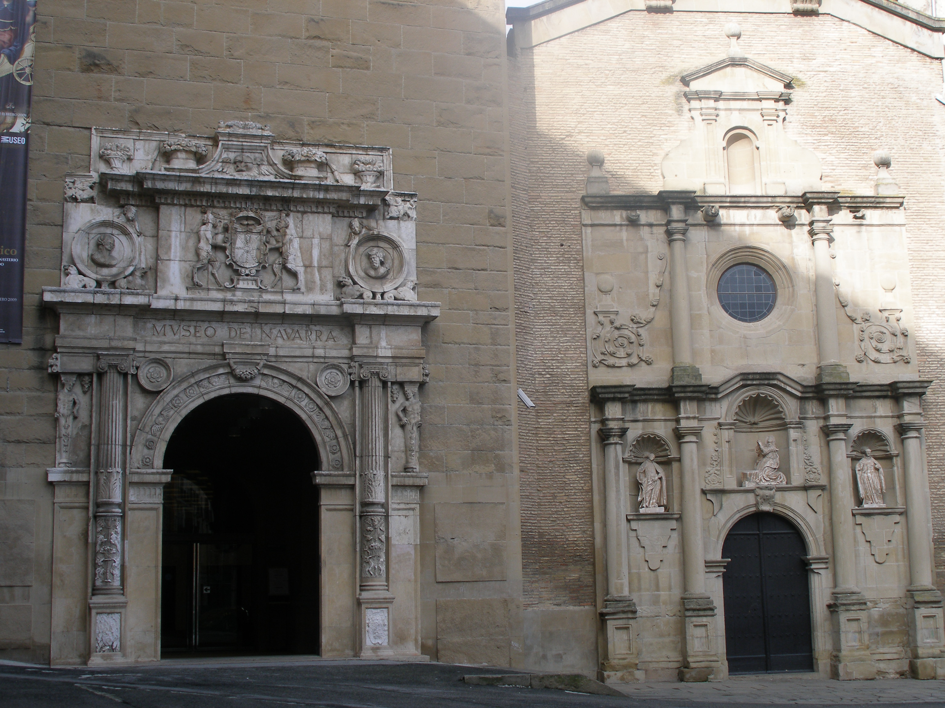 Nafarroako Museo sarrera